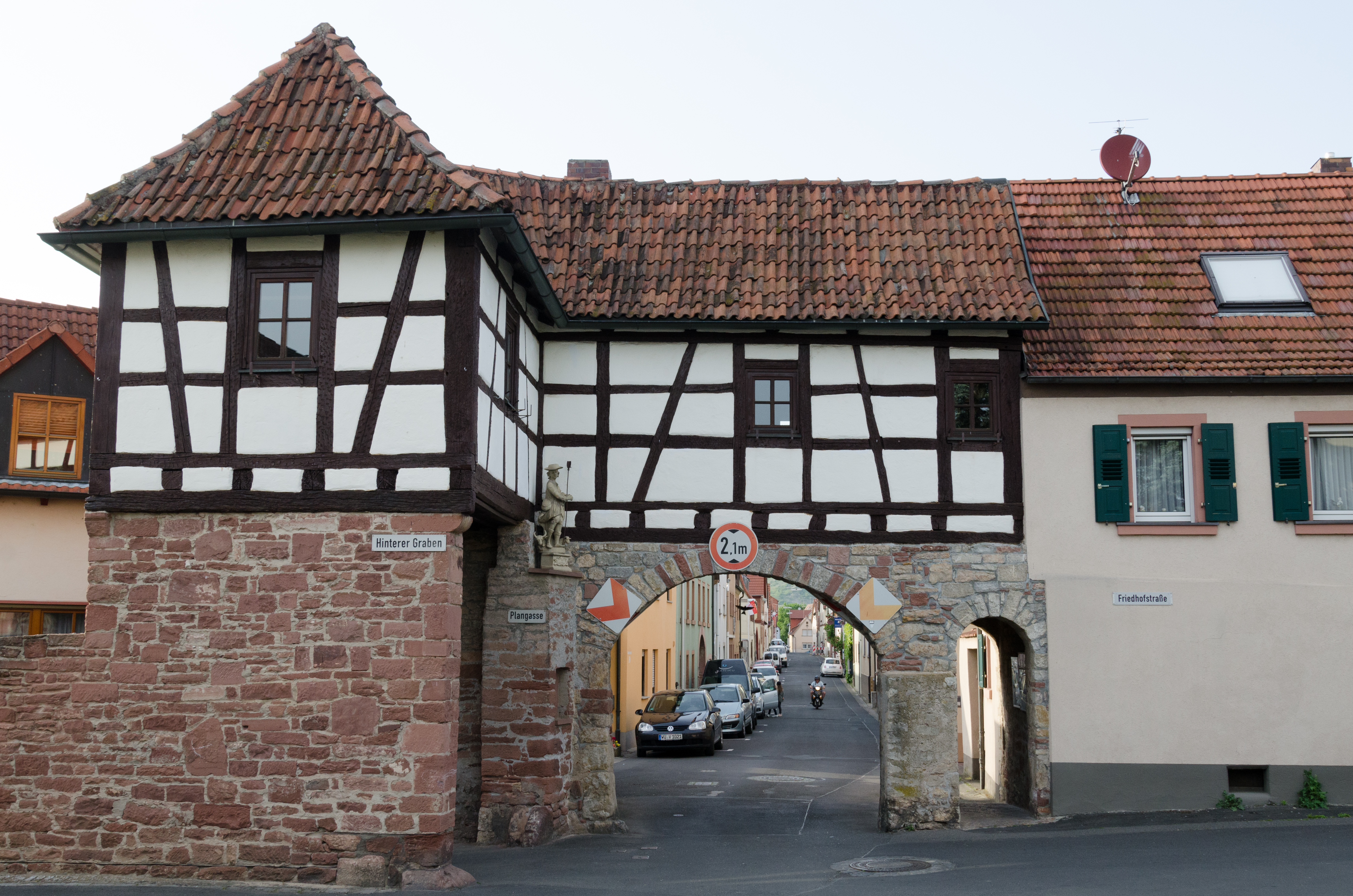 Thüngersheim, Hirtentor